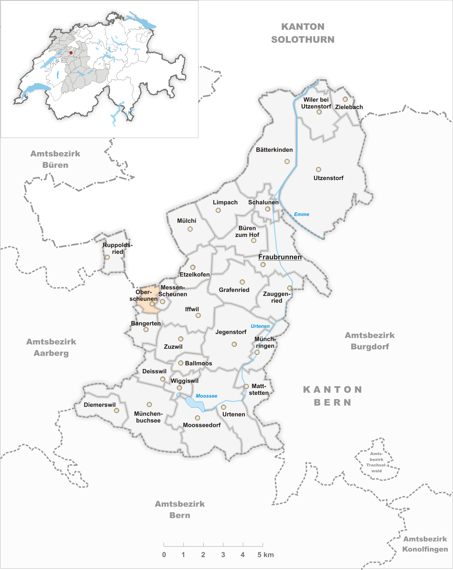 Municipality Oberscheunen